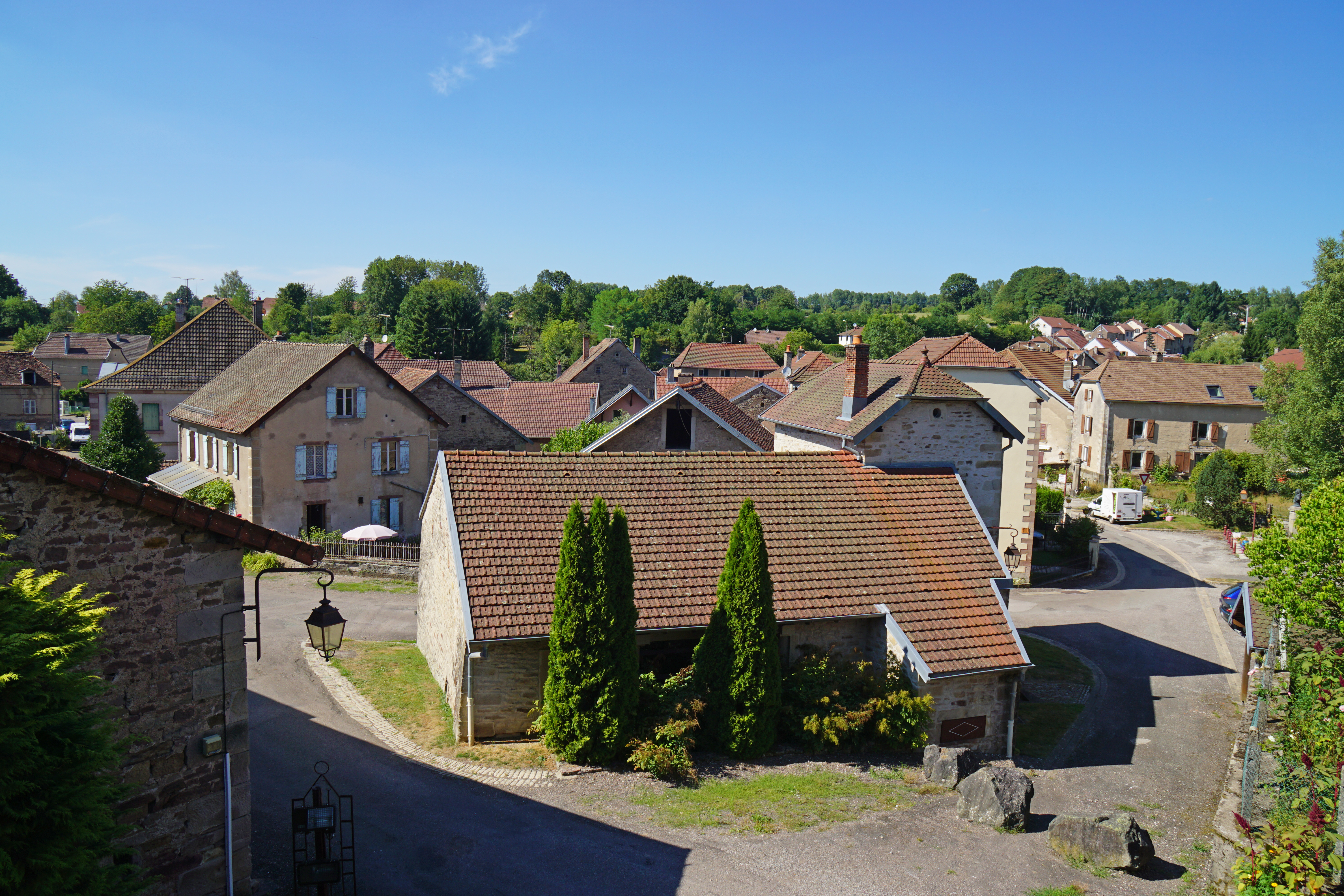 Clairegoutte.